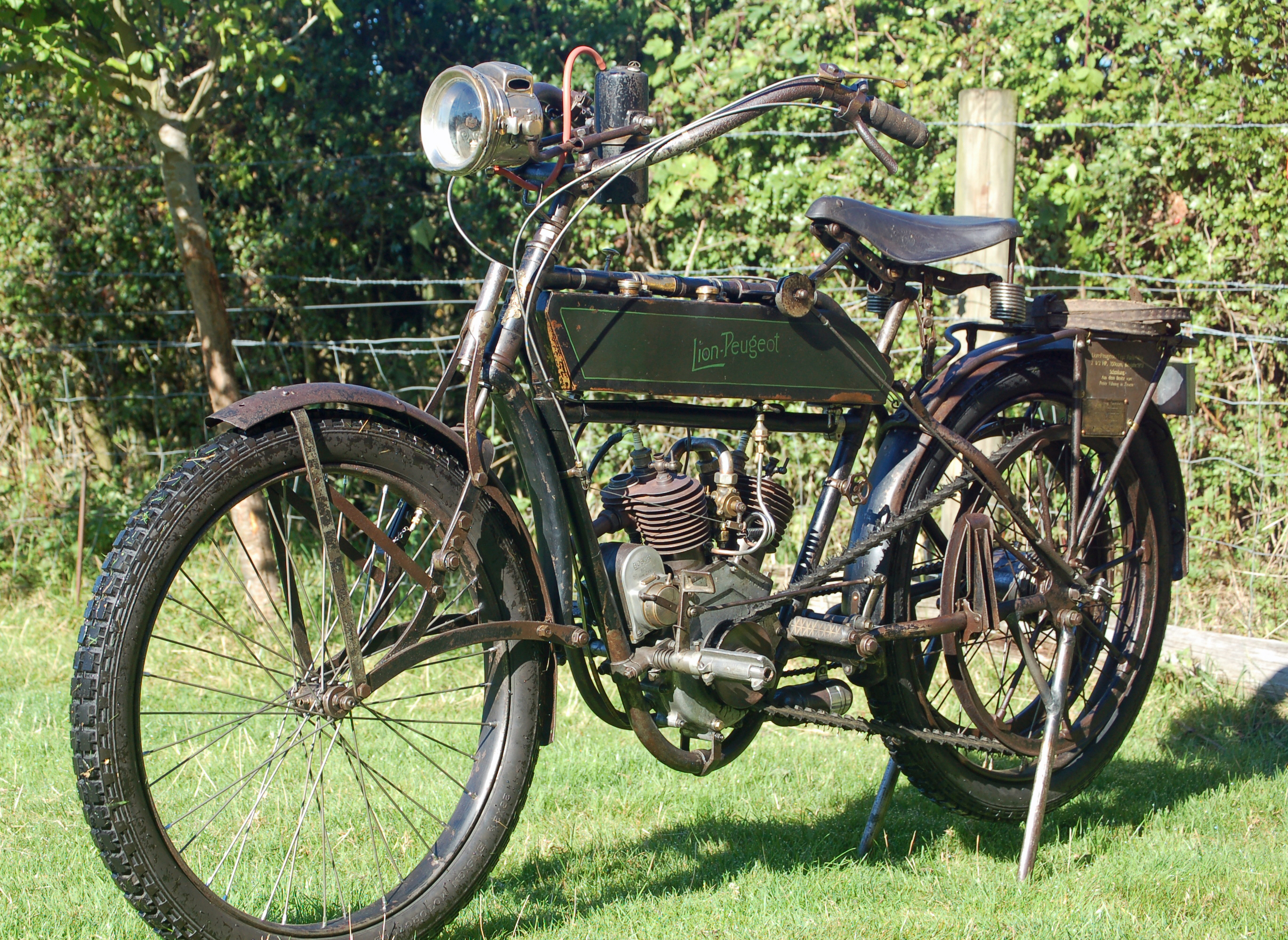 Lion Peugeot beim Oldtimertreffen auf dem Gelände des Speichenmuseums in Klein Offenseth-Sparrieshoop